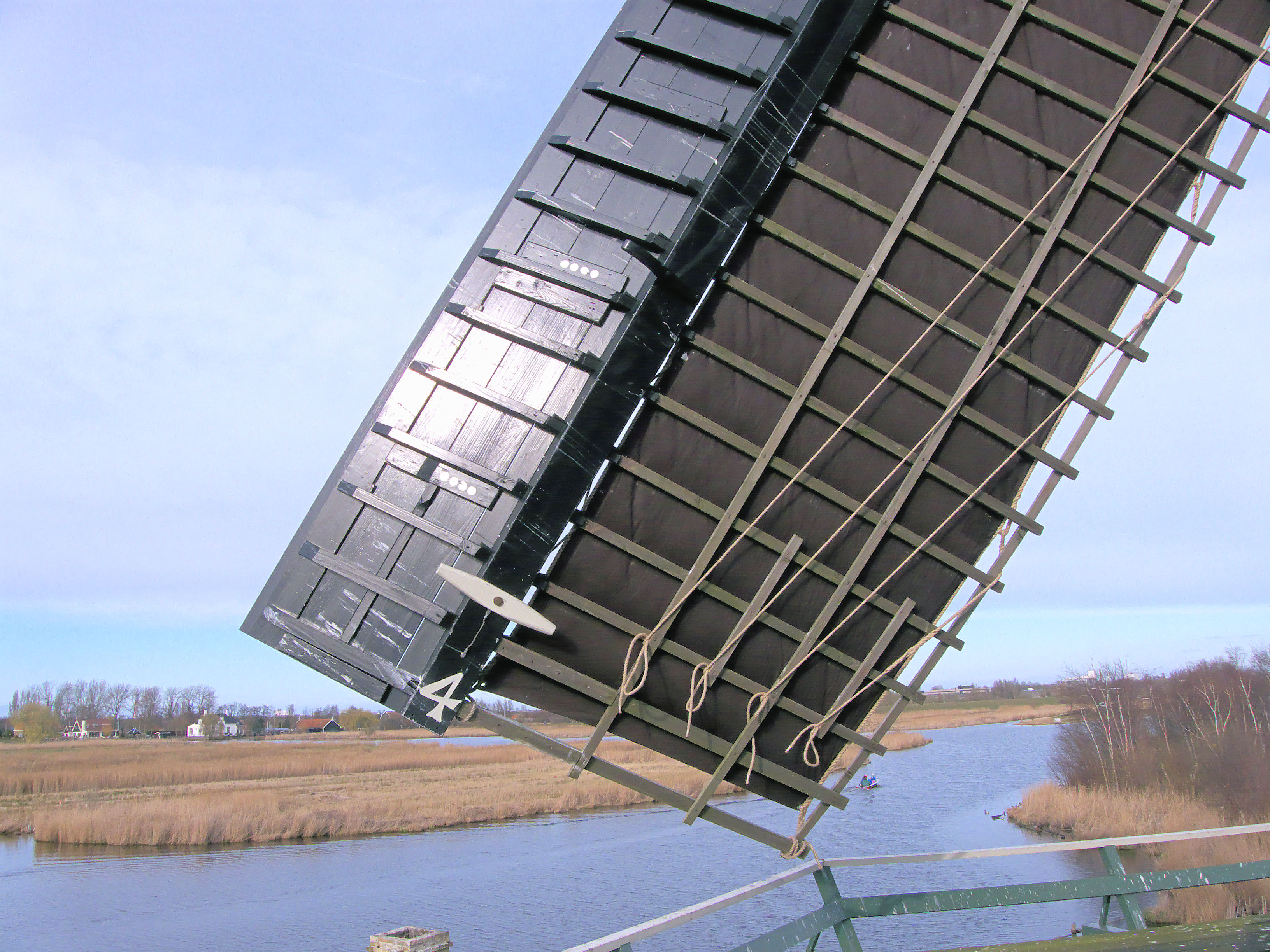 Molen Het Prinsenhof, achterkant wiek. Brede wiek nodig voor het pellen